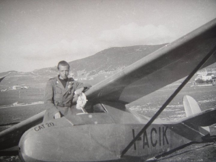 Il CAT 20 era un aliante monoposto ad ala alta a parasole con capacità acrobatiche prodotto dall'azienda italiana Cattaneo Alianti Taliedo / Costruzioni Aeronautiche Taliedo (CAT) negli anni trenta.